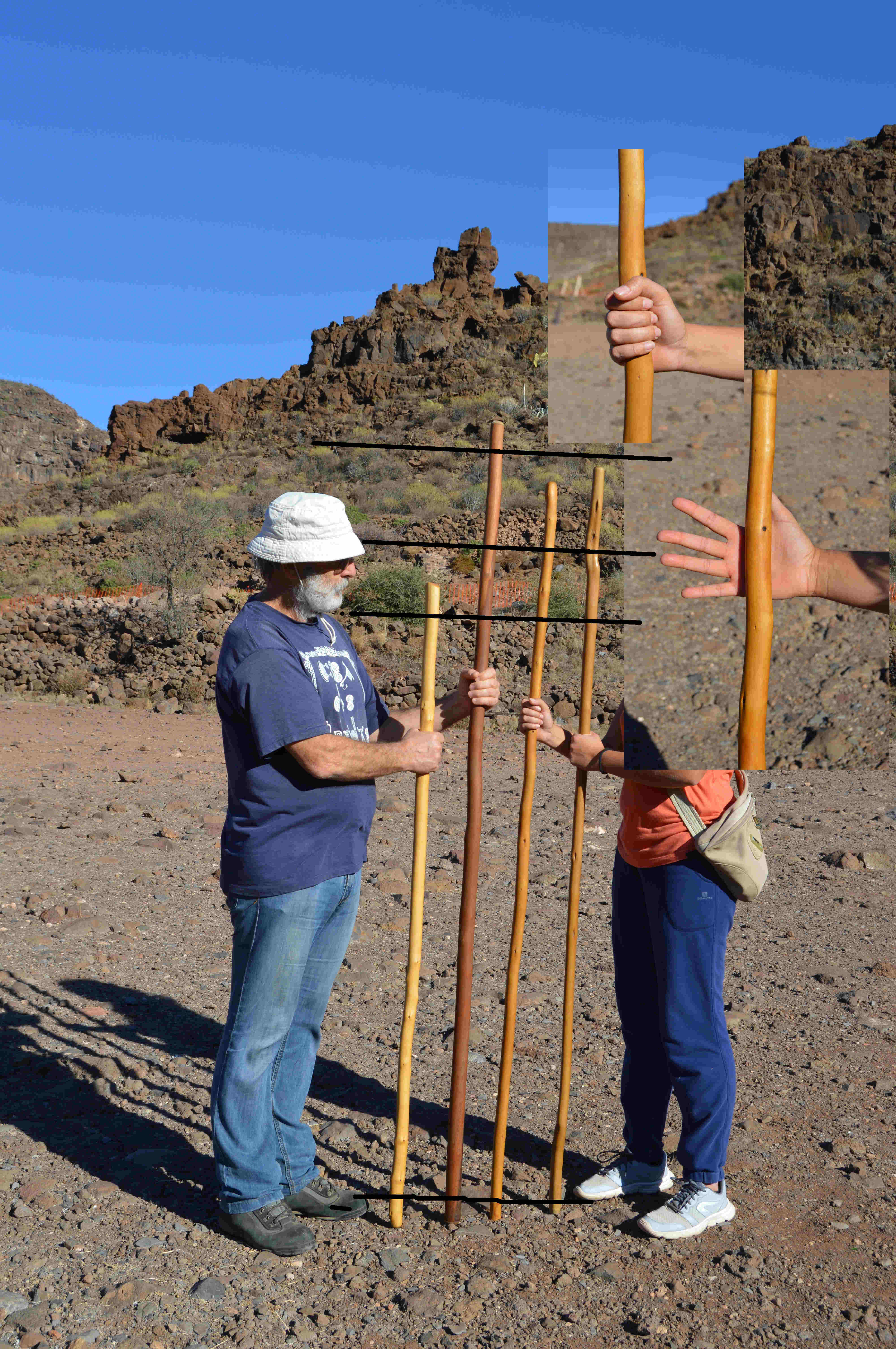 se ven las distintas medidas de los garrotes de lucha en comparación con la persona que lo usa.